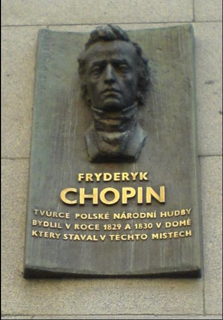 pametni deska Chopin na dome Ceske narodni banky v Praze